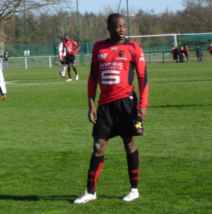 Jirès Kembo Ekoko en 2007 lors d'un match de CFA entre le Stade rennais et Guingamp.